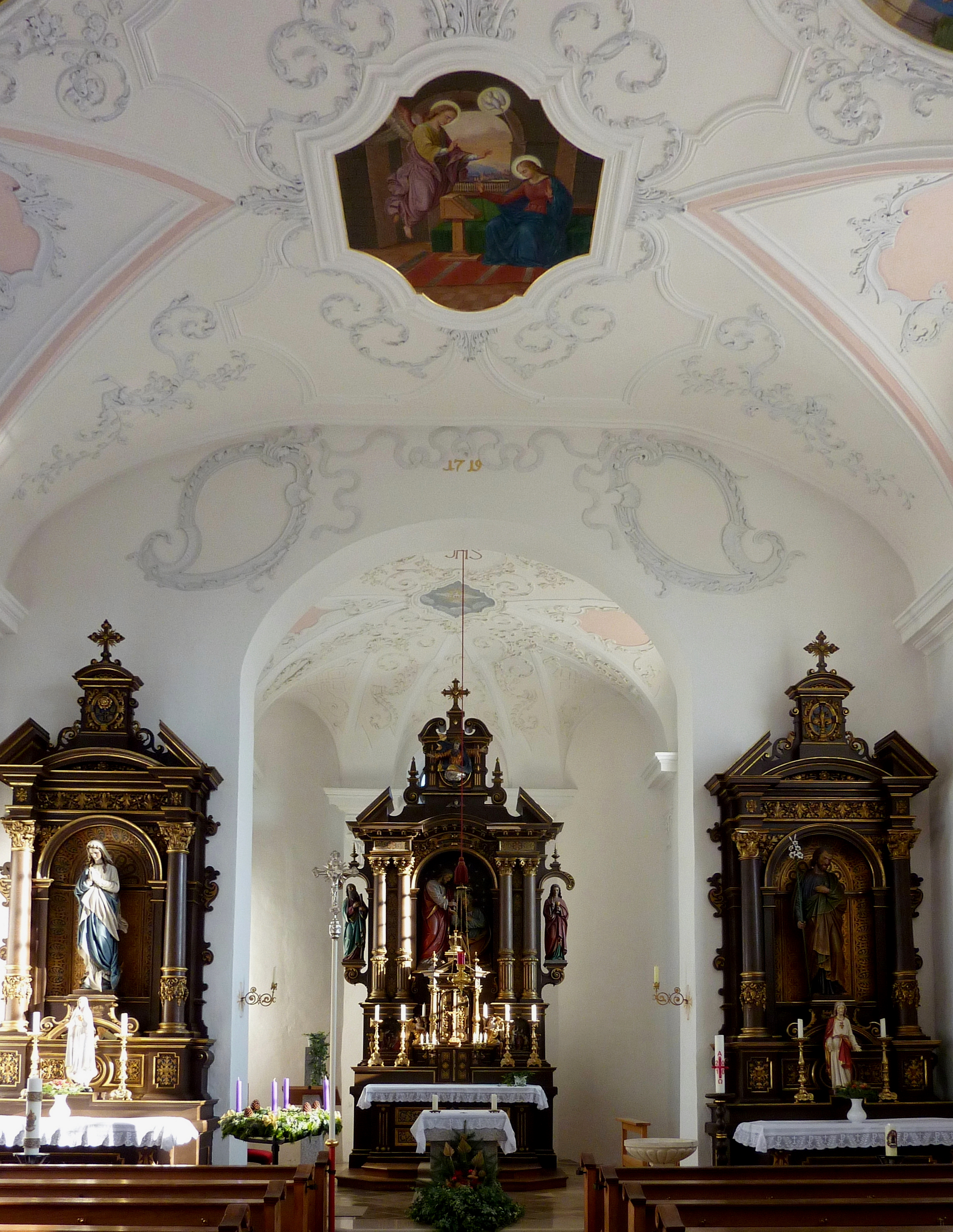 Katholische Pfarrkirche St. Peter in Burghagel, einem Ortsteil der Gemeinde Bachhagel im Landkreis Dillingen an der Donau (Bayern), Innenraum mit Blick zum Chor